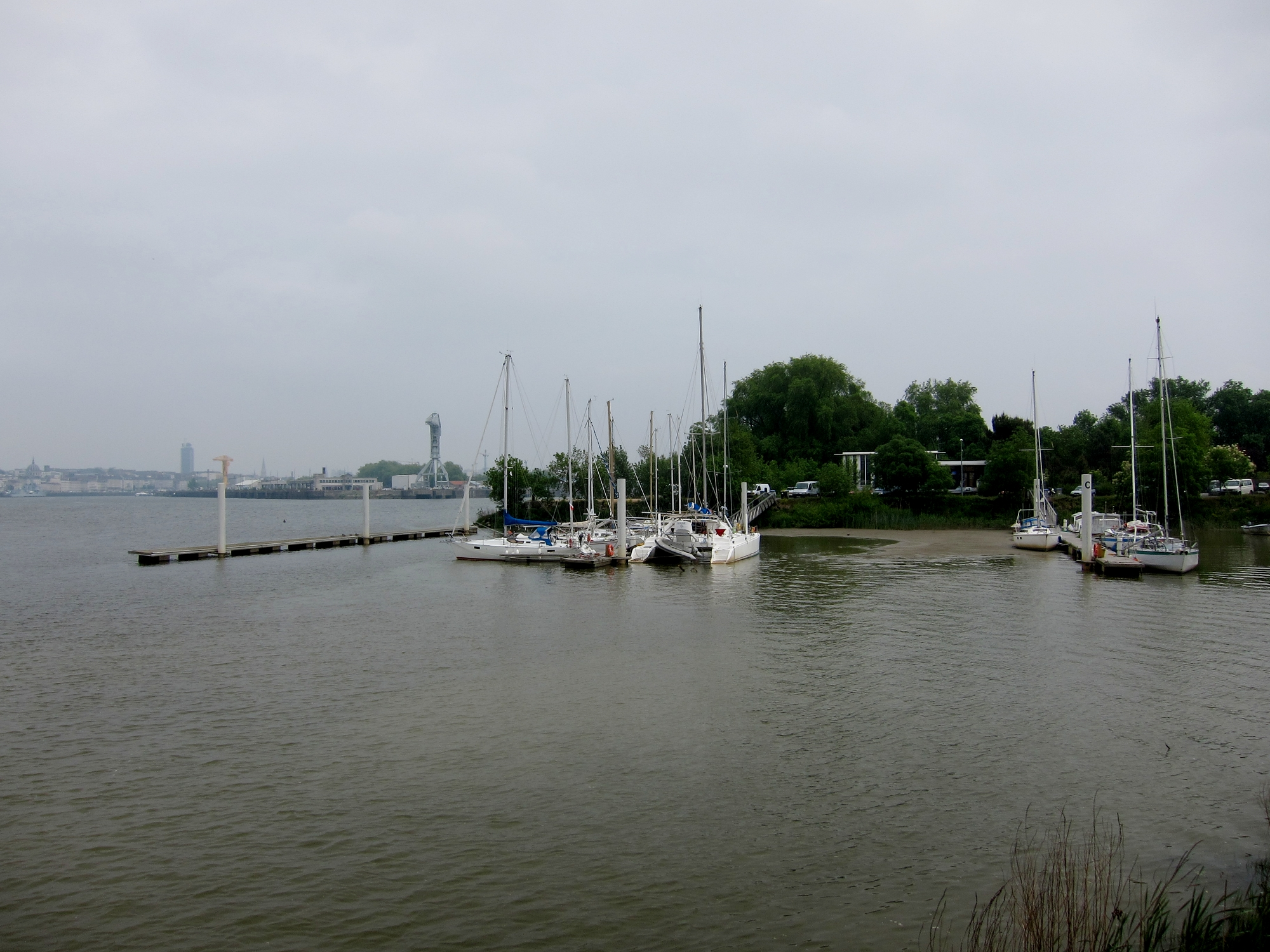 Le port de Trentemoult.